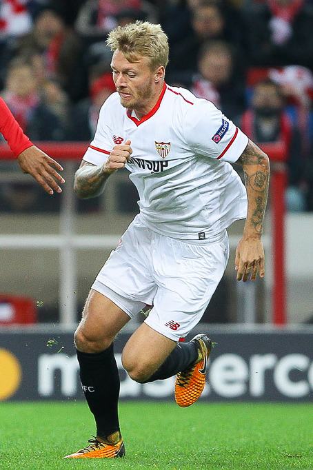 «Спартак» - «Севилья»